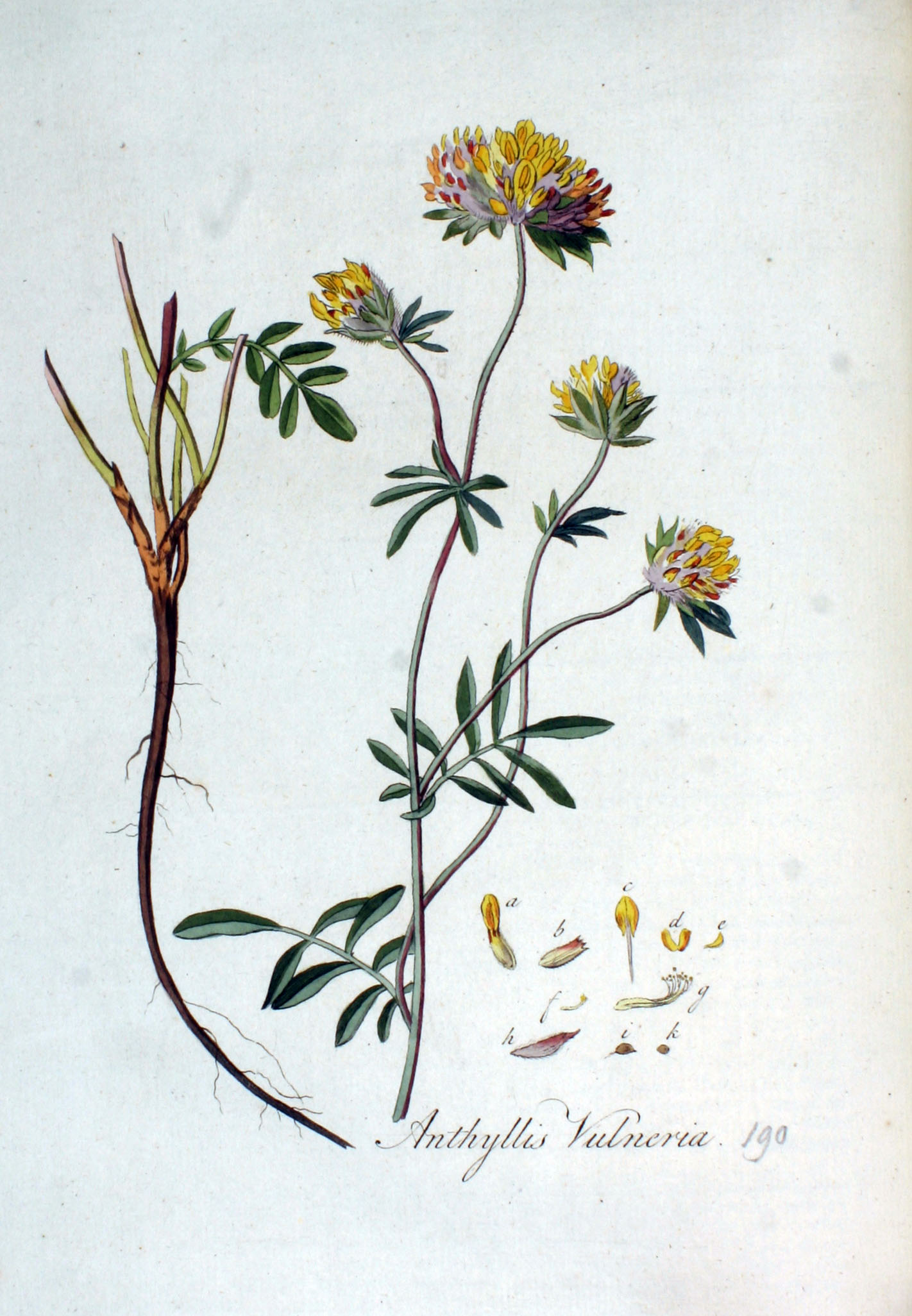 Anthyllis vulneraria L.